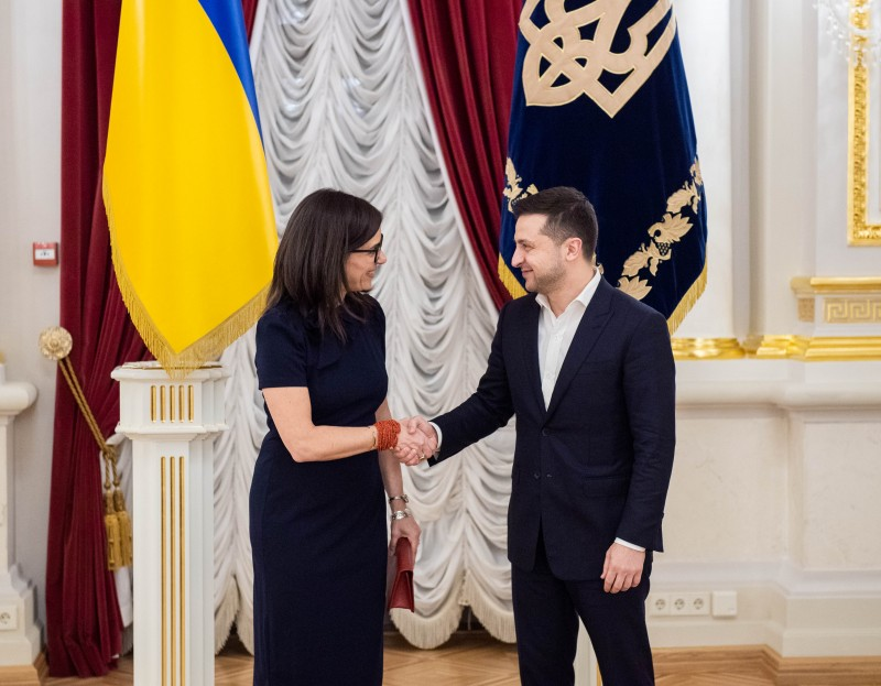 Президент України Володимир Зеленський прийняв вірчі грамоти у послів низки іноземних держав: Канада - Лариса Галадза